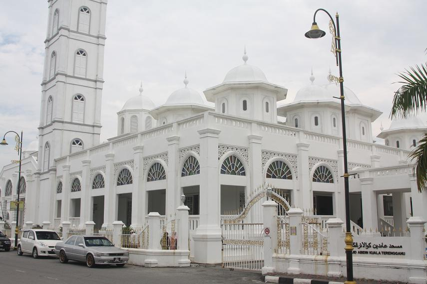 Abidin Mosque, Kuala Terengganu Mosque in Kuala Terengganu